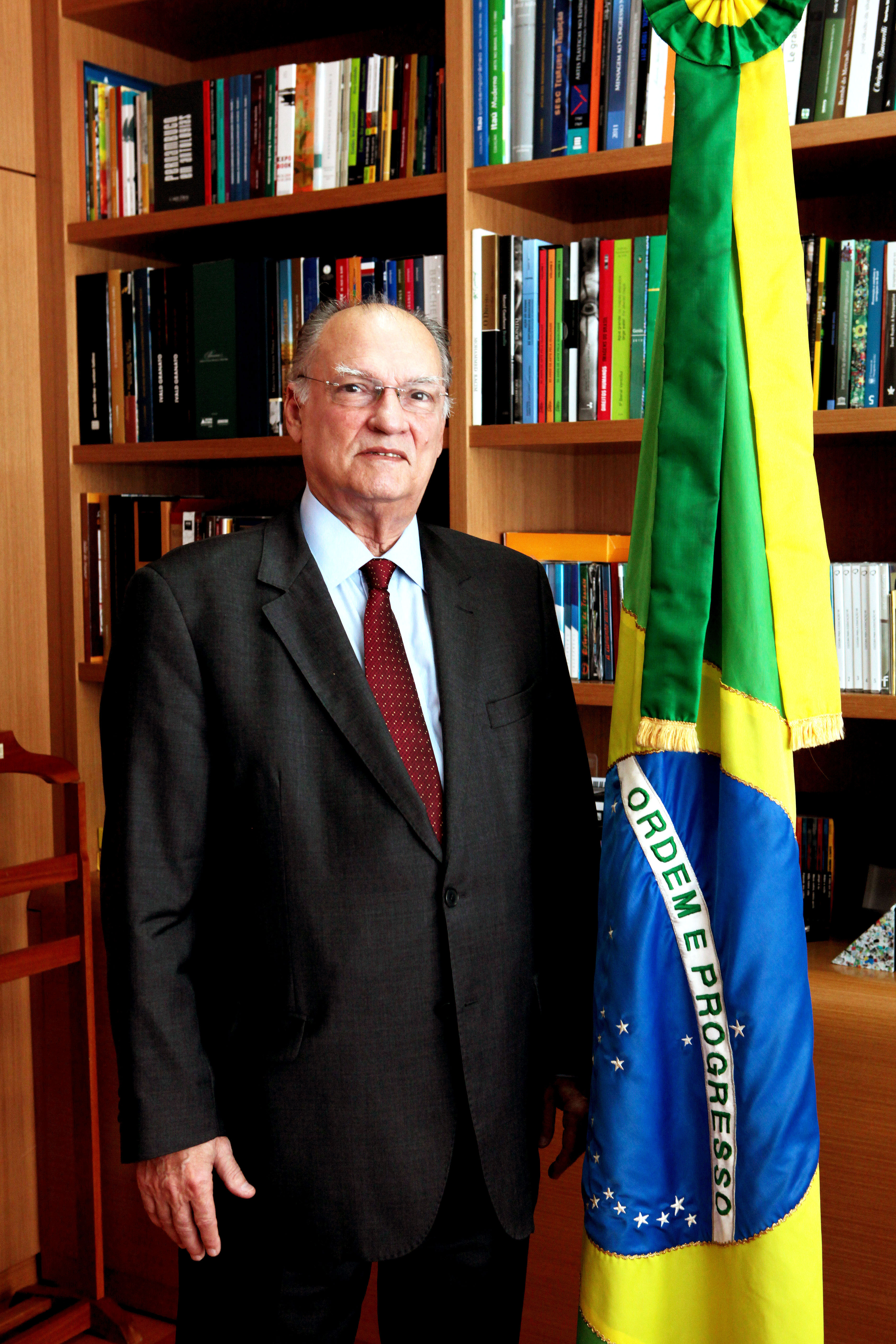 Brasília 19.12.2016 Ministro da Cultura, Roberto Freire. Fotos: Acácio Pinheiro/MinC